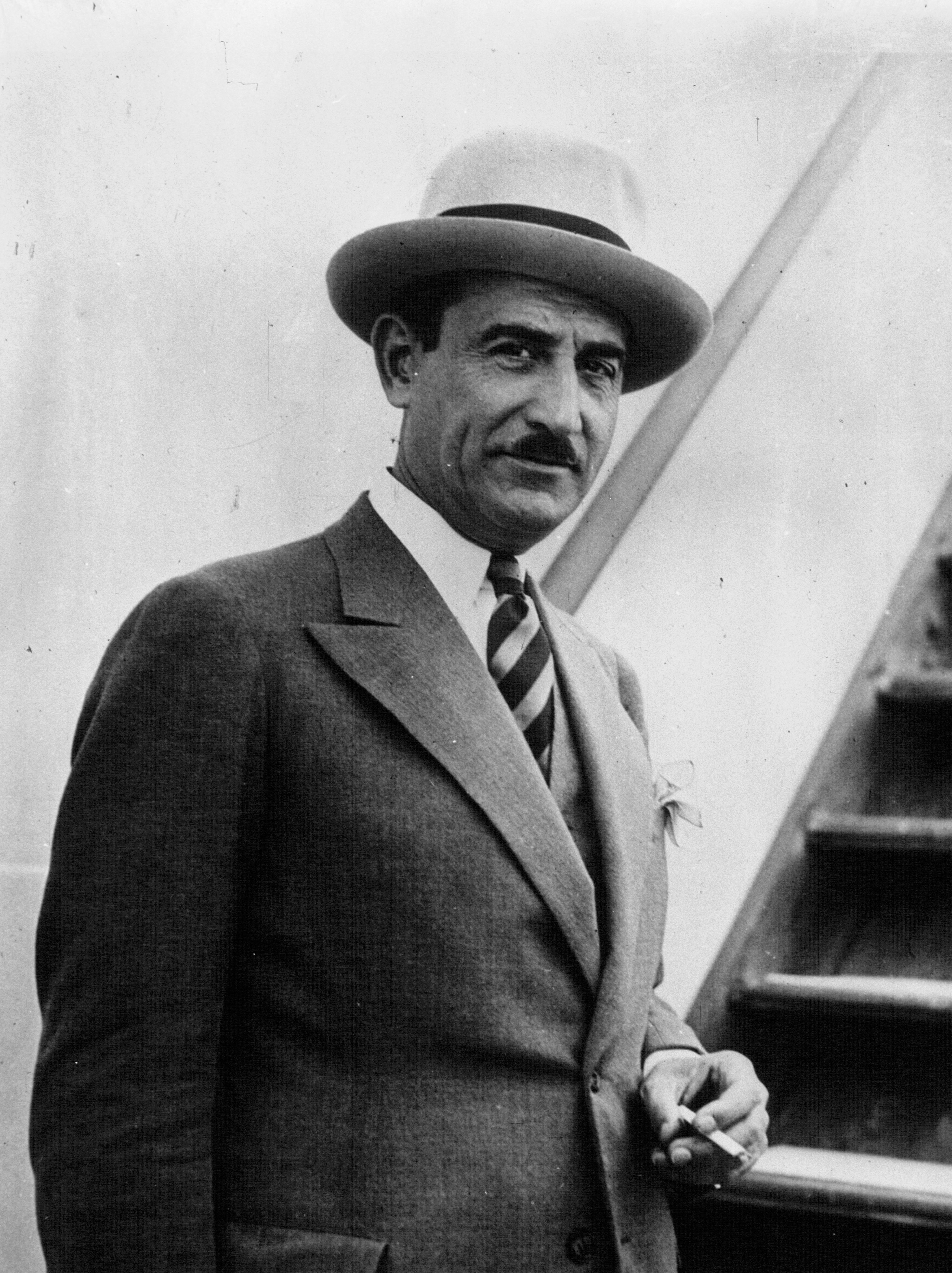 Marquet, maire de Bordeaux [photographie de presse]